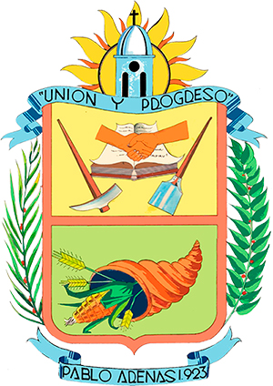 Idea y diseño: Señor Lázaro Ruiz. Arreglos adicionales: Señor Nelson Torres Ejecución: Profesor Torres